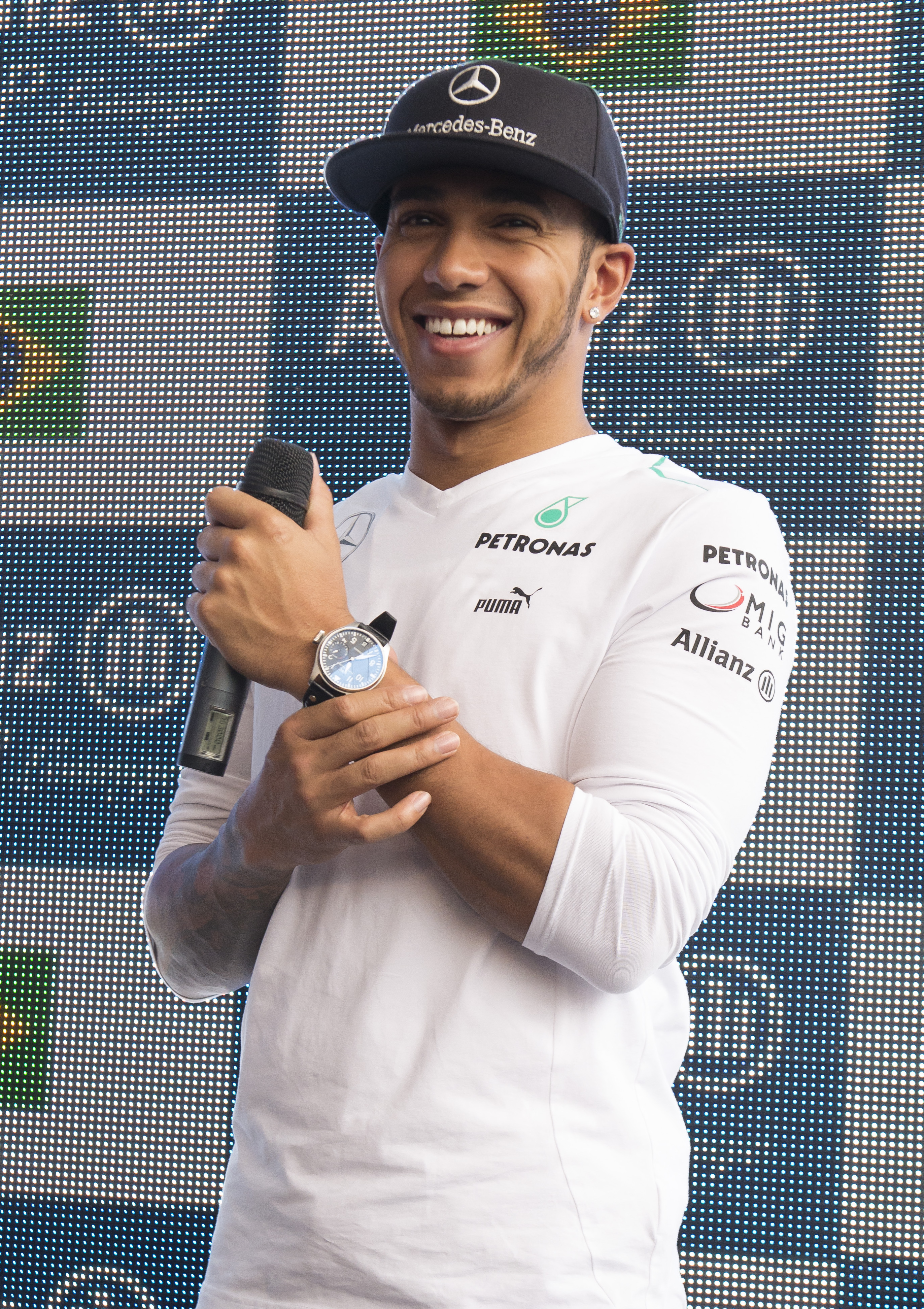 Visita do Lewis Hamilton ao Allianz VIP Lounge. GP Brasil de Fórmula 1. Autodromo de Interlagos. São Paulo. Brasil. 24/11/13.